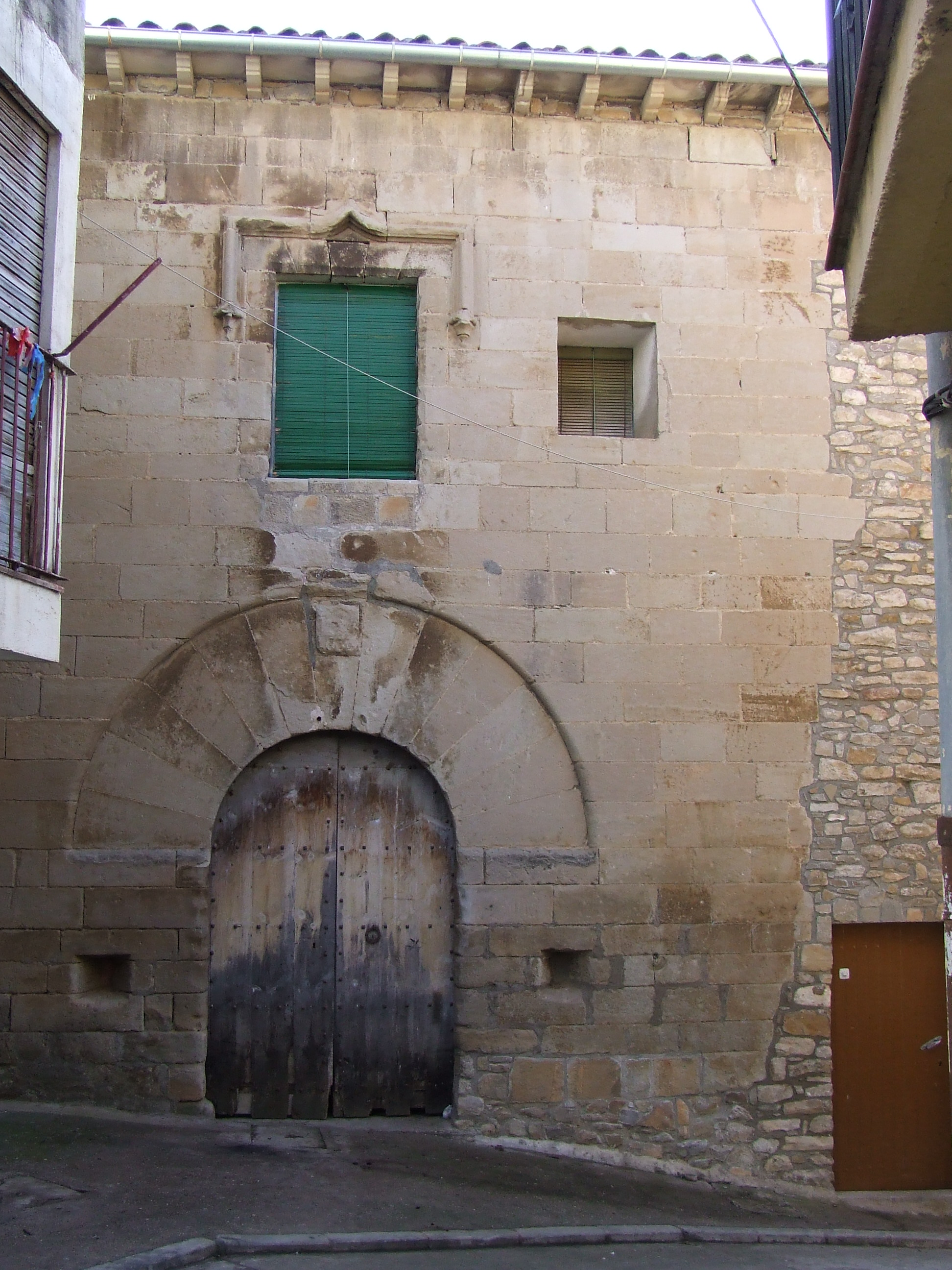 Casa senyorial al carrer del Forn de Palau de Noguera (Tremp, Pallars Jussà)